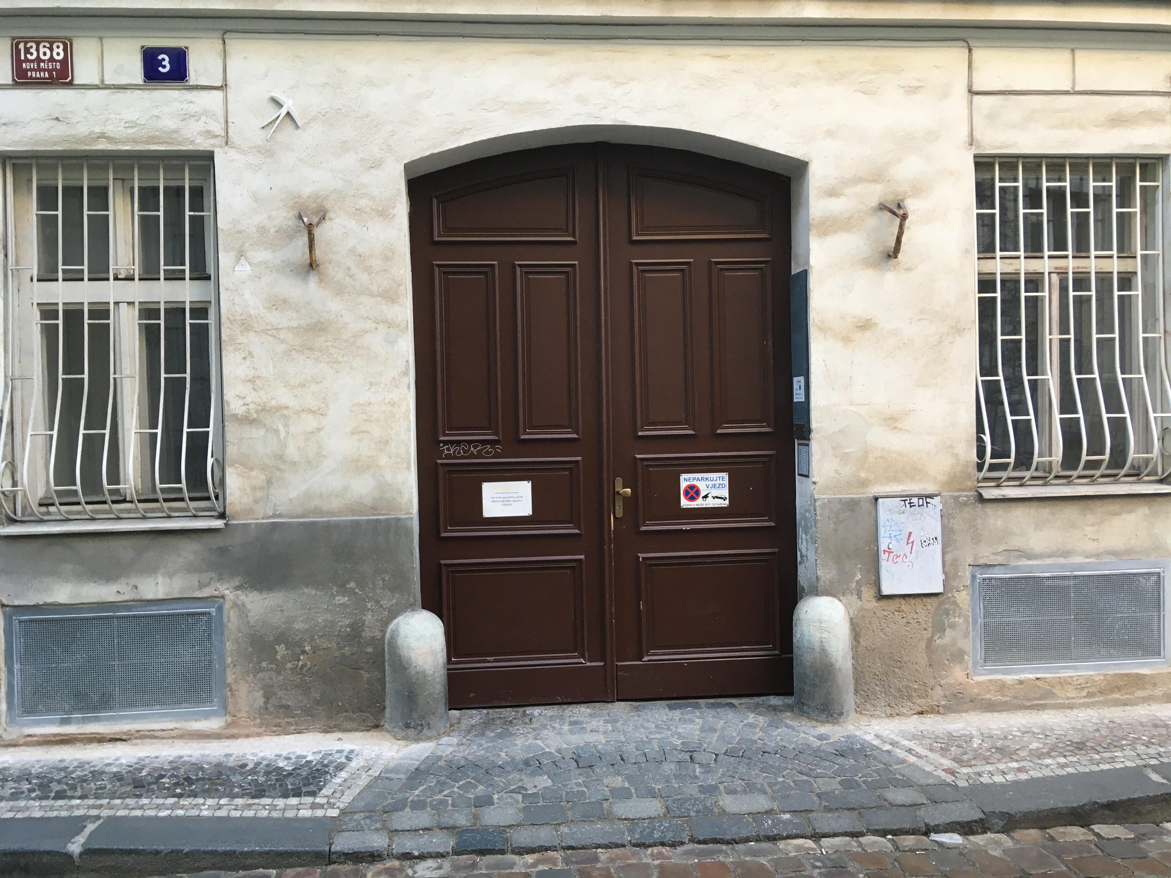 Černá 1368/3, 110 00 Praha 1-Nové Město.